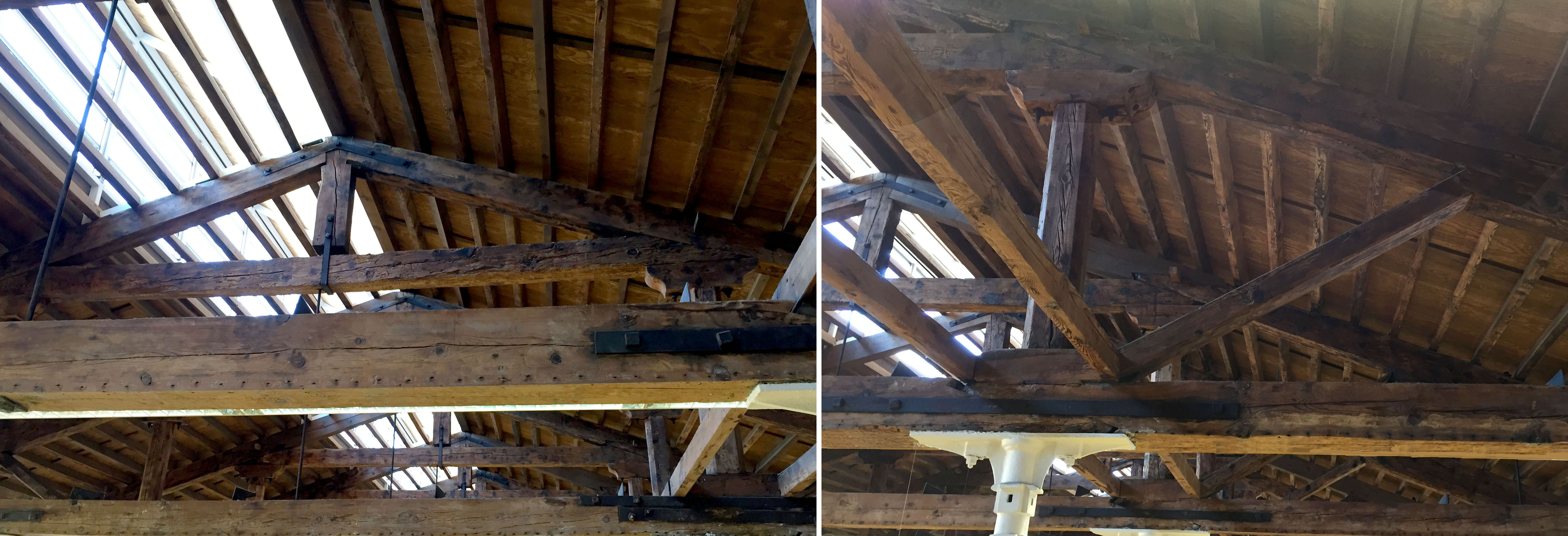 Sostre original de la fàbrica.